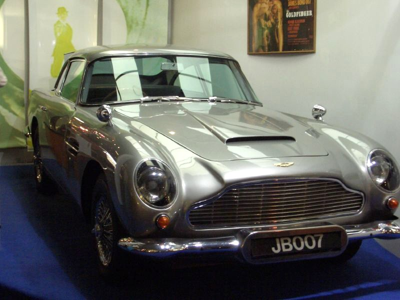 James Bond DB5 in Museum Jersey.